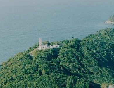 Photo du phare de l'Île de la Paz, Etat de Santa Catarina, Brésil.